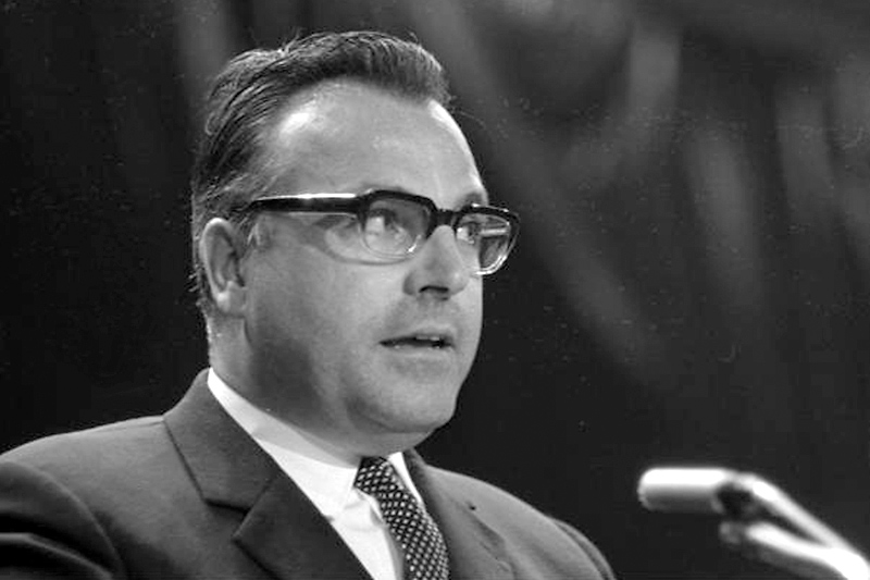 Bundeskanzler Kiesinger bei einer öffentlichen Kundgebung in der Friedrich-Ebert-Halle in Ludwigshafen (Helmut Kohl)